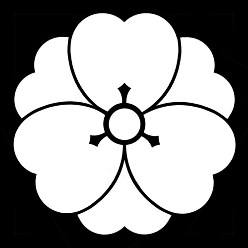 「八重片喰」紋（染抜）